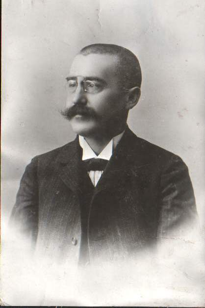 Січинський Денис. Потрет